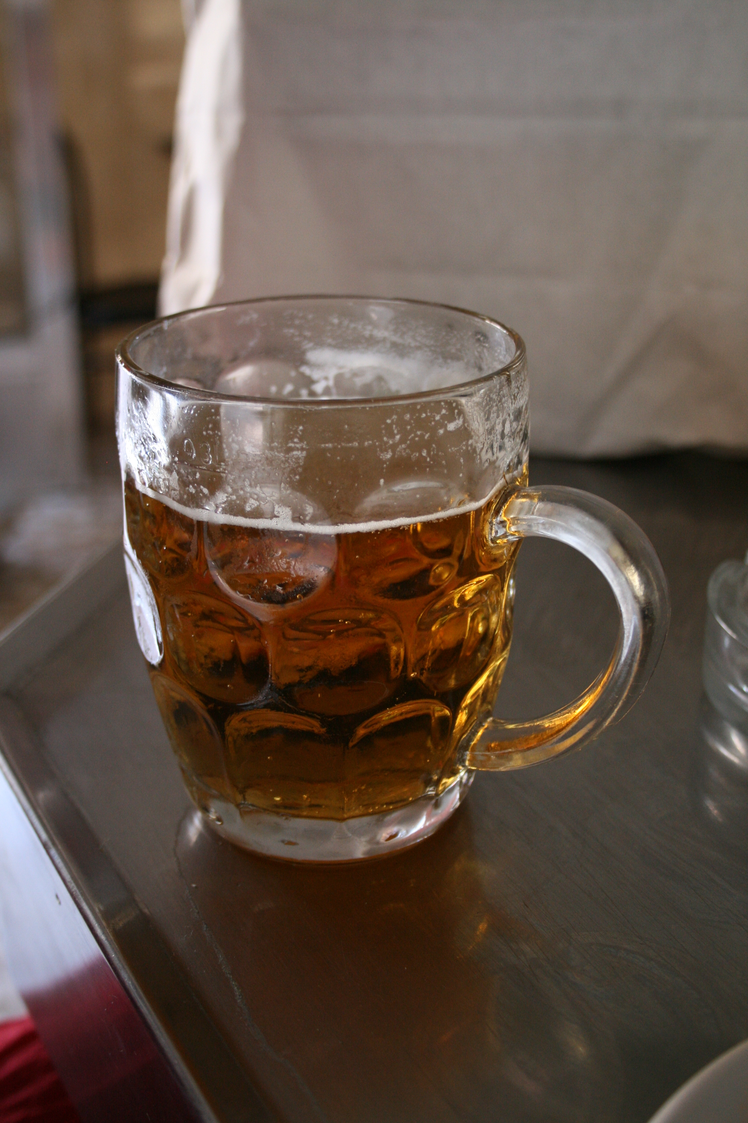 Jarra de Mahou